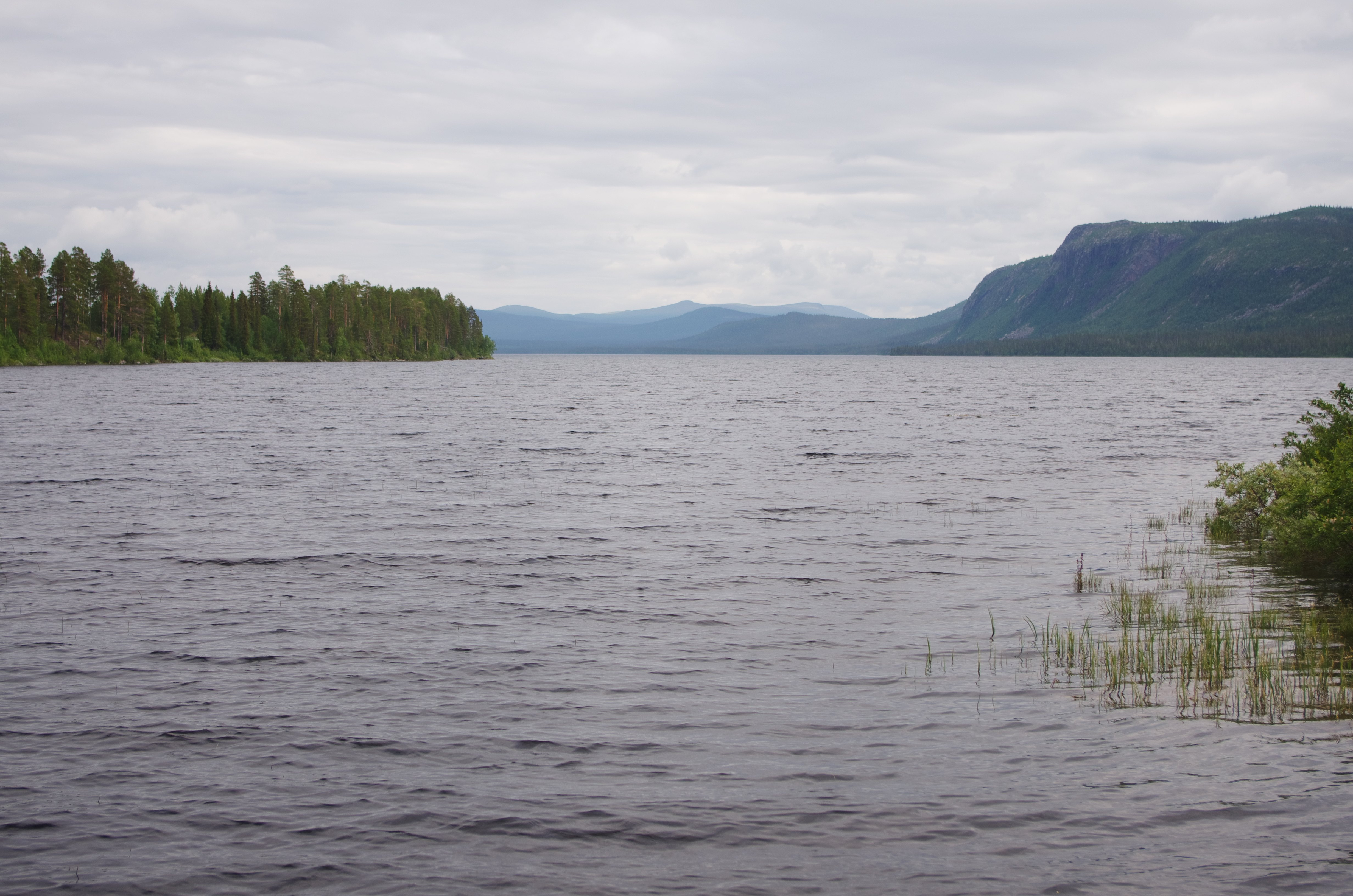 Saggat (nyare stavning Sakkat) är en sjö i Jokkmokks kommun i Lappland i Sverige. Orten Kvikkjokk (samiska Huhttán) ligger vid sjöns nordspets. Fotot taget från fjällbyn Årrenjarka (nyare stavning Oarrenjárgga) åt öst.